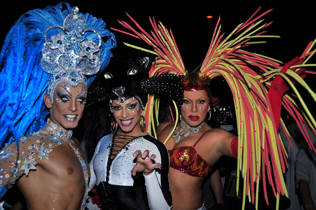 Colour Cologne, Köln